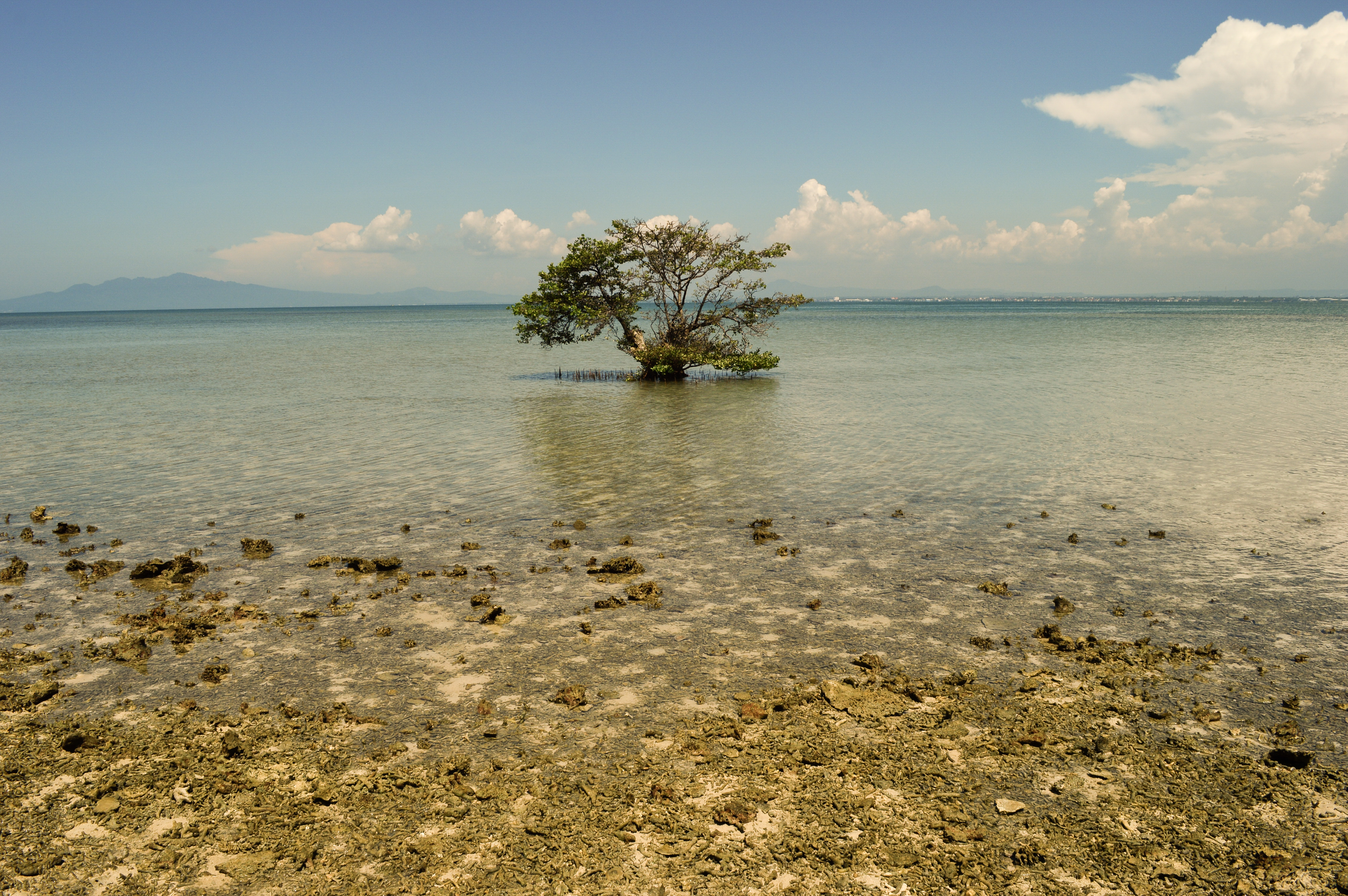 Salah satu pohon yang tersisa dari seberang pantai Pulau Gede akibat abrasi yang mengikis luasnya Pulau Gede yang kini luasnya sekitar sembilan hektare. Pantai di tengah laut ini terletak 2 mil ke arah sebelah timur pulau Marongan, berjarak sekitar 5 km dari tepi pantai di kota Rembang.